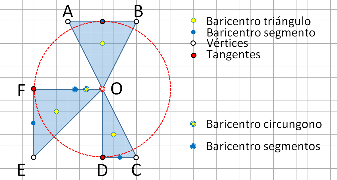 Propiedades del circungono